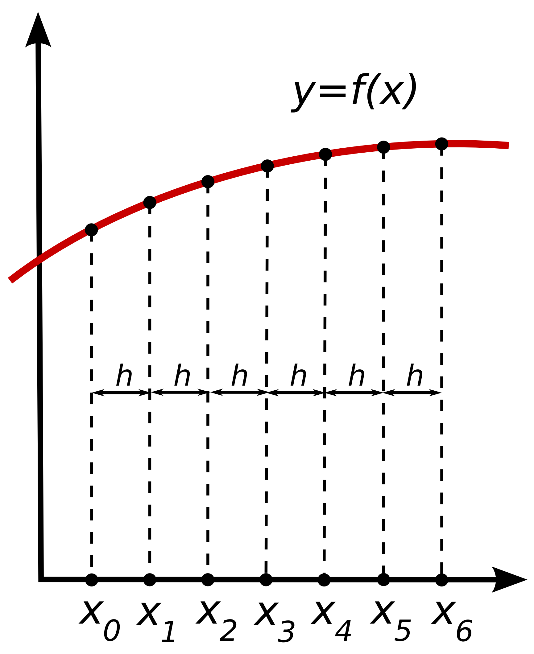 Finite Differences